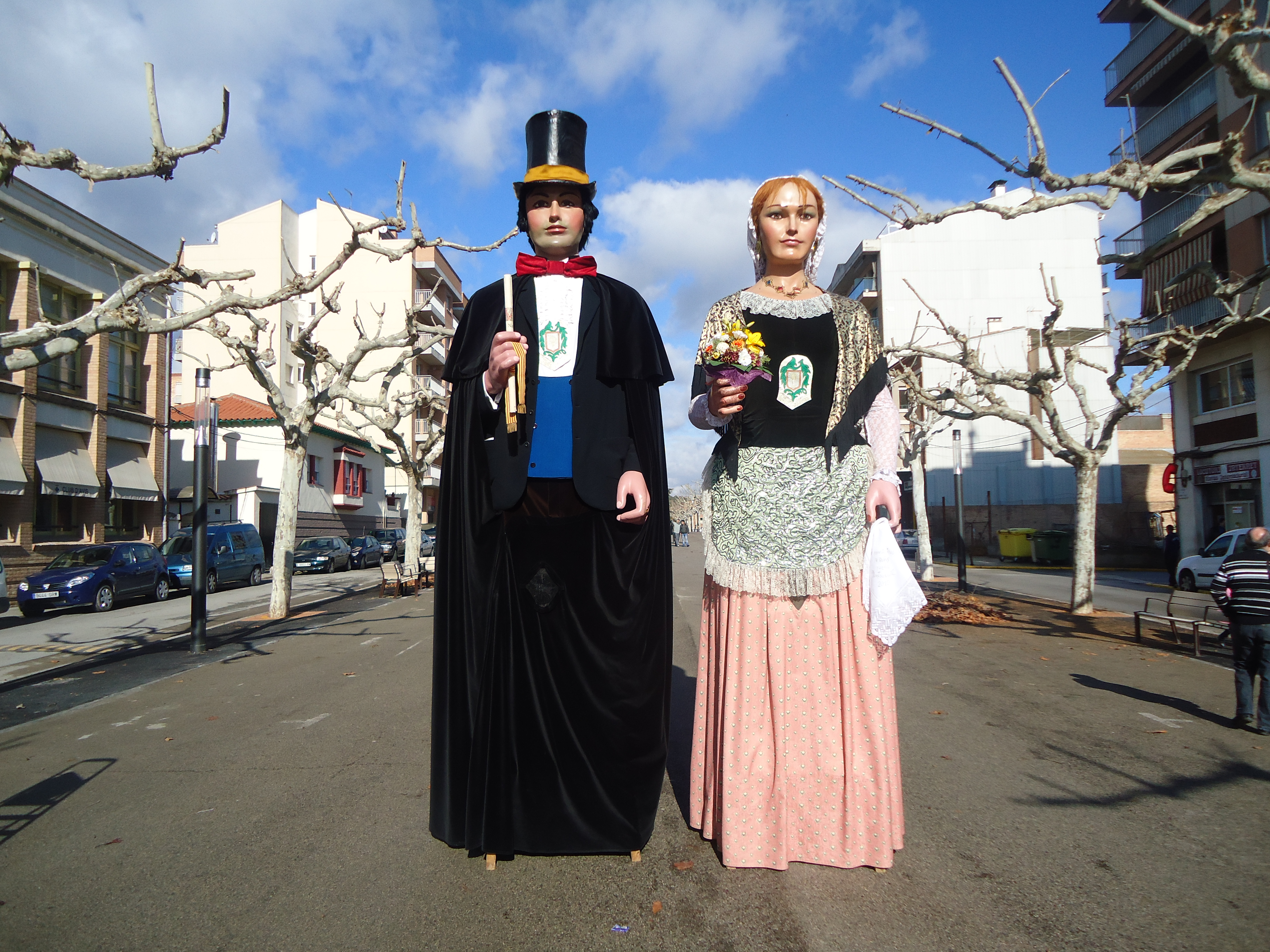 Els gegants pubills de Navàs, el Jordi i la Montserrat.